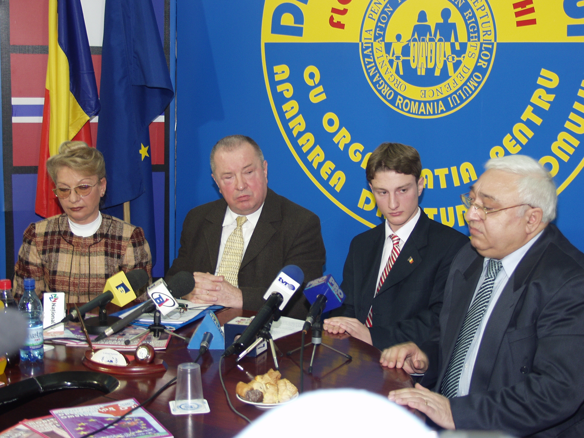 Andrei Tinu intr-o conferinta de presa la OADO impreuna cu mama sa si cei doi avocati Sergiu Andon si Valeriu Matei